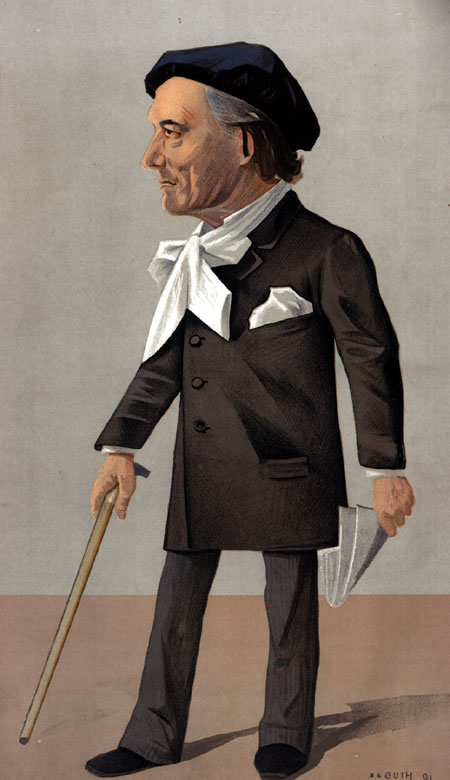 Caricature of Victorien Sardou (1831-1908). Caption read "Ficelle Dramatique".